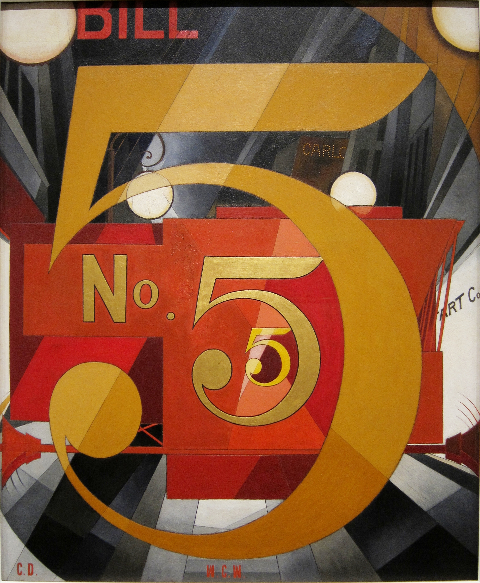 The Figure 5 in gold in The Metropolitan Museum of Art, New York City.